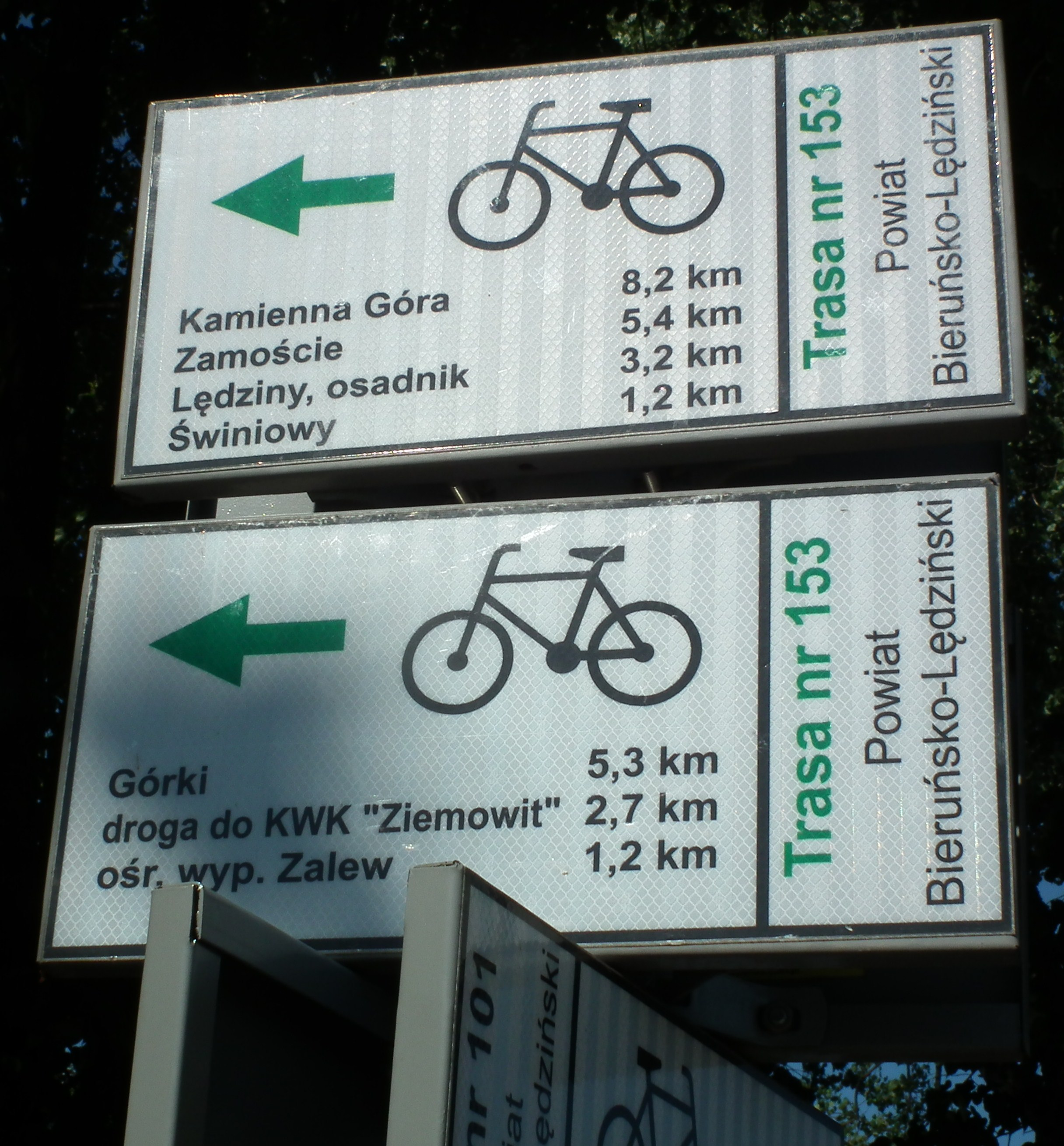 Lędziny. Hołdunów, ul. Hołdunowska. Trasy rowerowe.